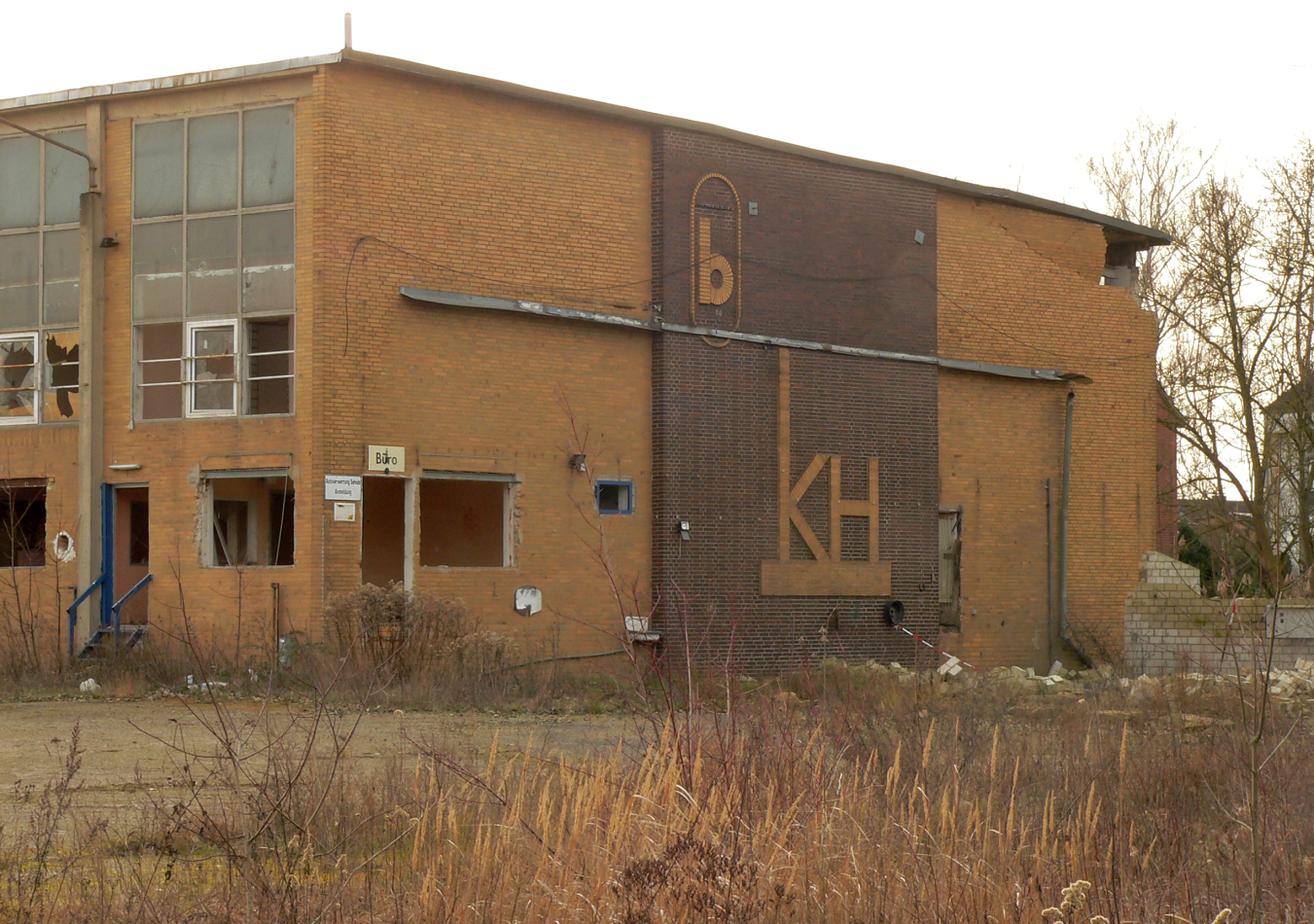 Keramische Hütte in Sehnde